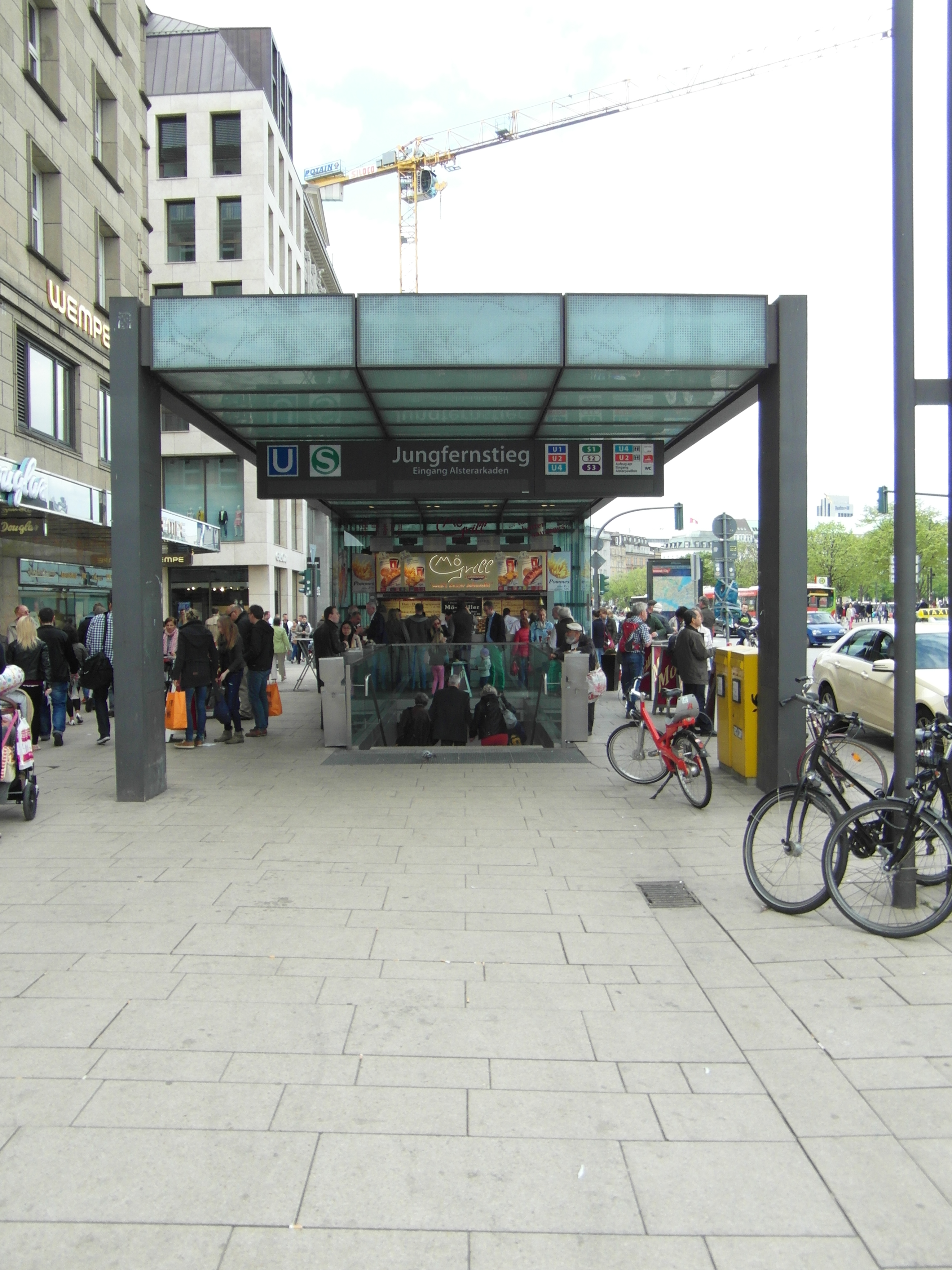 U-Bahnhof Jungfernstieg in Hamburg - Verteiler- und Zwischenebenen